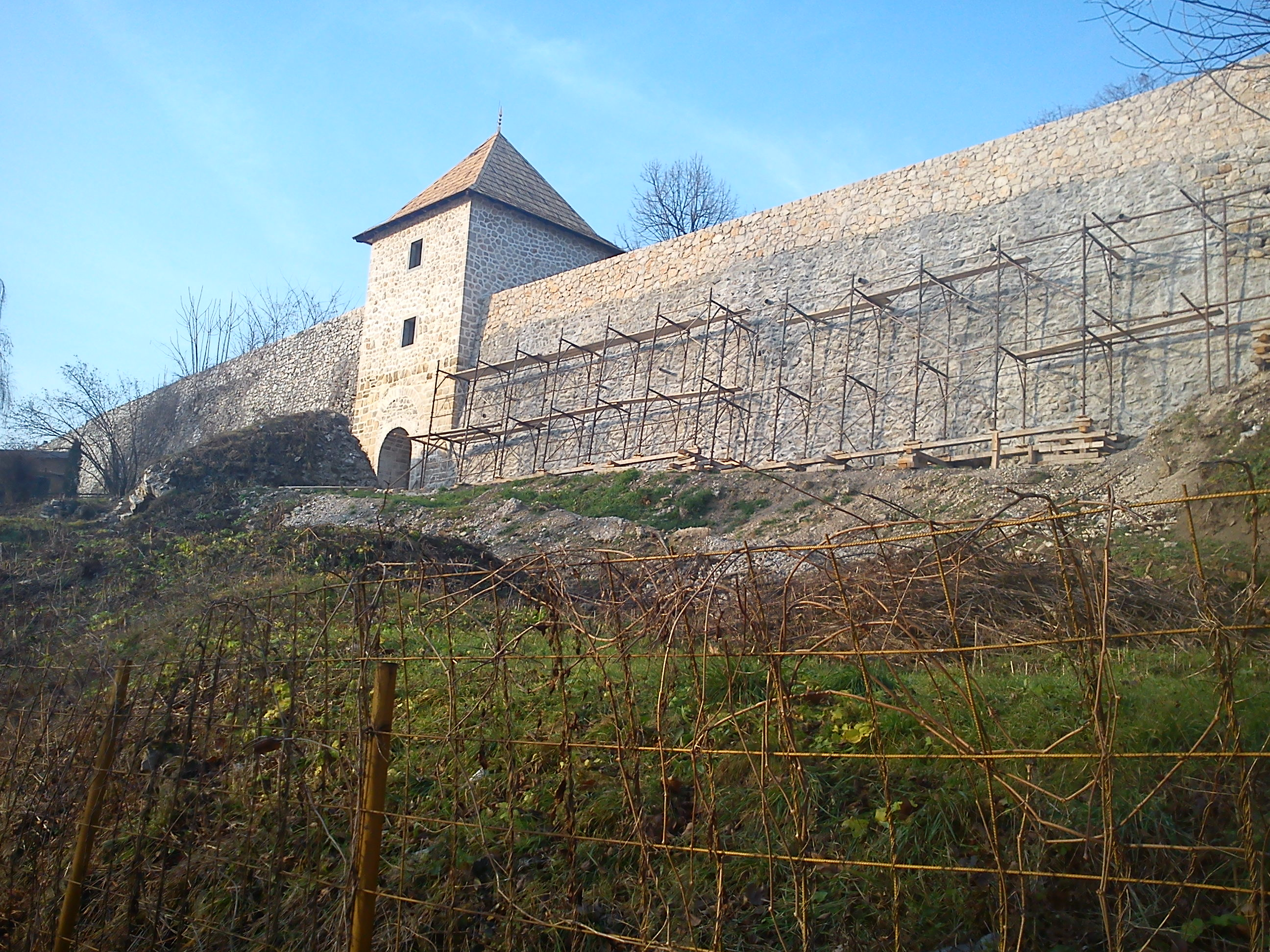 Кастел БЛ, источни дио који је у процесу реконструкције